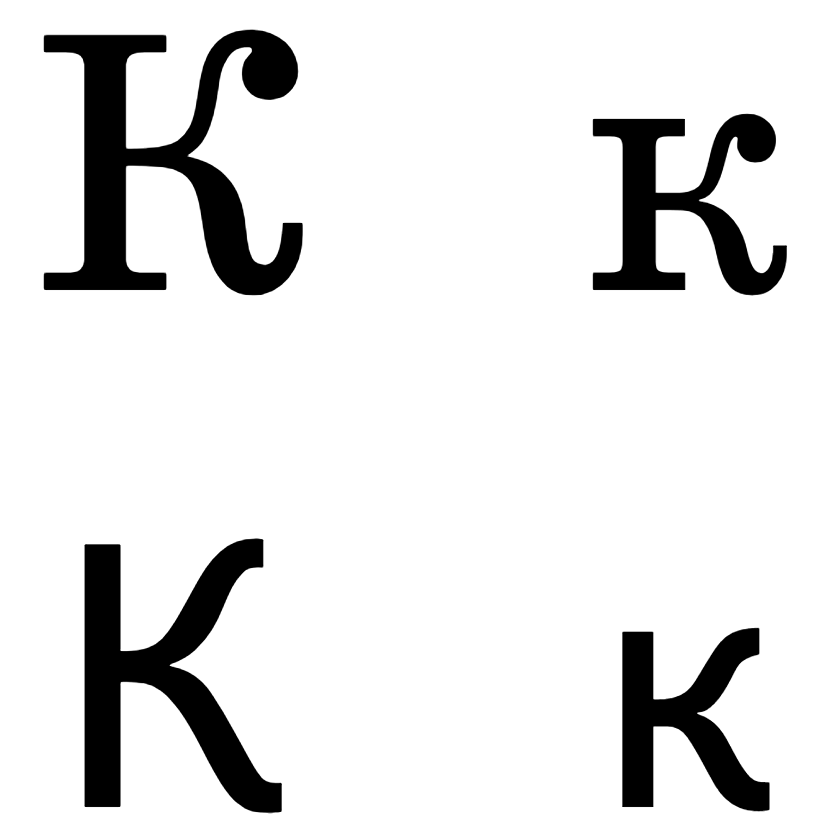 Буквы К, к гарнитур Школьная и Букварная